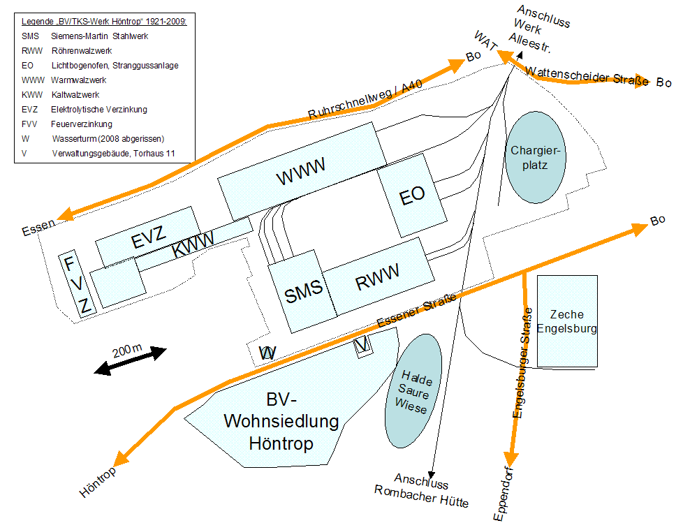 Lageplan der Gebäude und Werksteile des Höntroper Werkes von Bochumer Verein / ThyssenKrupp-Stahl. Die Gebäude des Siemens-Martin Stahlwerks und das Röhrenwalzwerk existieren nicht mehr, ebenso der markante Wasserturm.